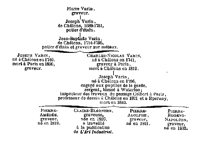 Varin family tree from Henri Béraldi, "Les Graveurs du XIXe siècle", vol XII, 1892.